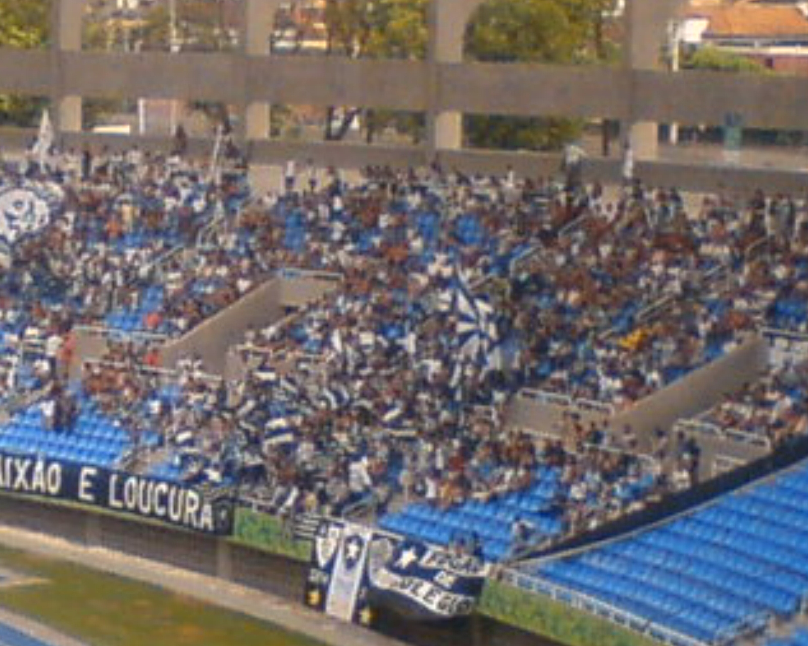 Movimento Loucos pelo Botafogo na ala sul do Estádio Olímpico João Havelange, visto do setor oeste superior, em partida contra o Resende FC em 19 de janeiro de 2008, estréia do Campeonato Carioca de 2008.